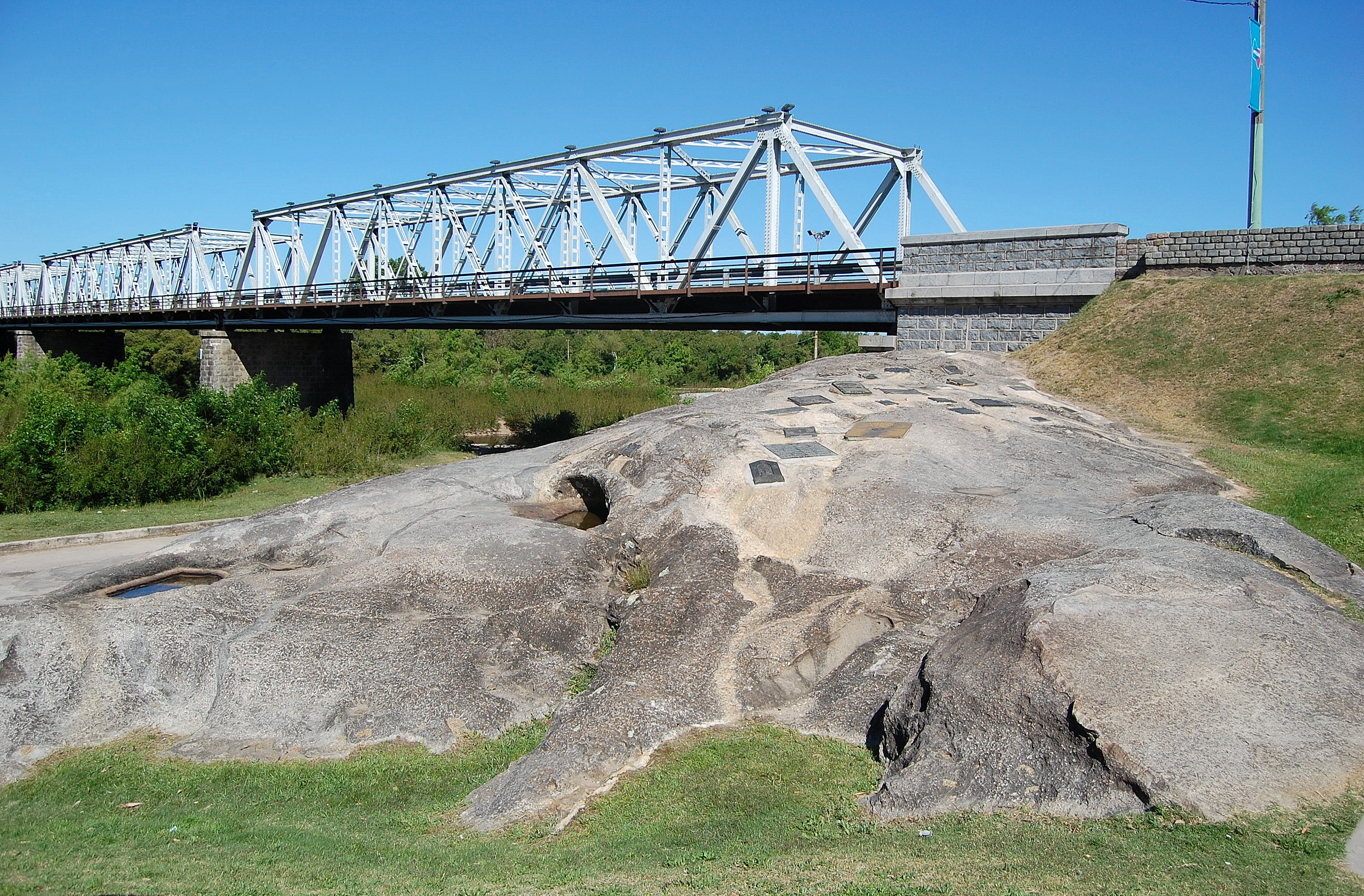 La Piedra Alta, declarada Altar de la Patria y monumento histórico nacional, ubicada junto al río Santa Lucía Chico, en la ciudad de Florida, capital del departamento del mismo nombre, fue el lugar donde se promulgaron las leyes que declaraban la independencia de la Provincia Oriental.